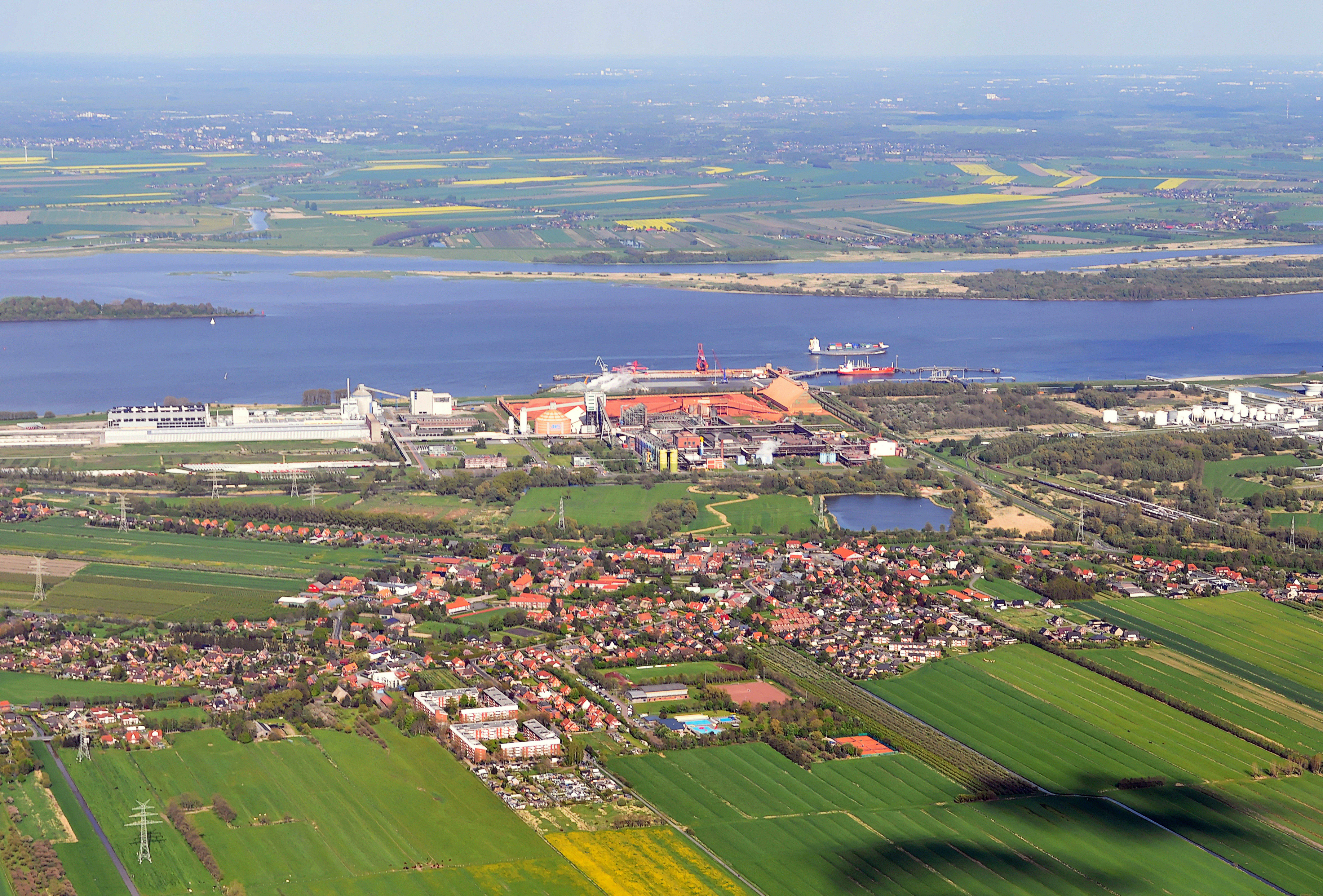 Luftbilder von der Nordseeküste 2012-05